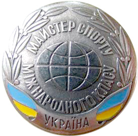 Майстер спорту України міжнародного класу